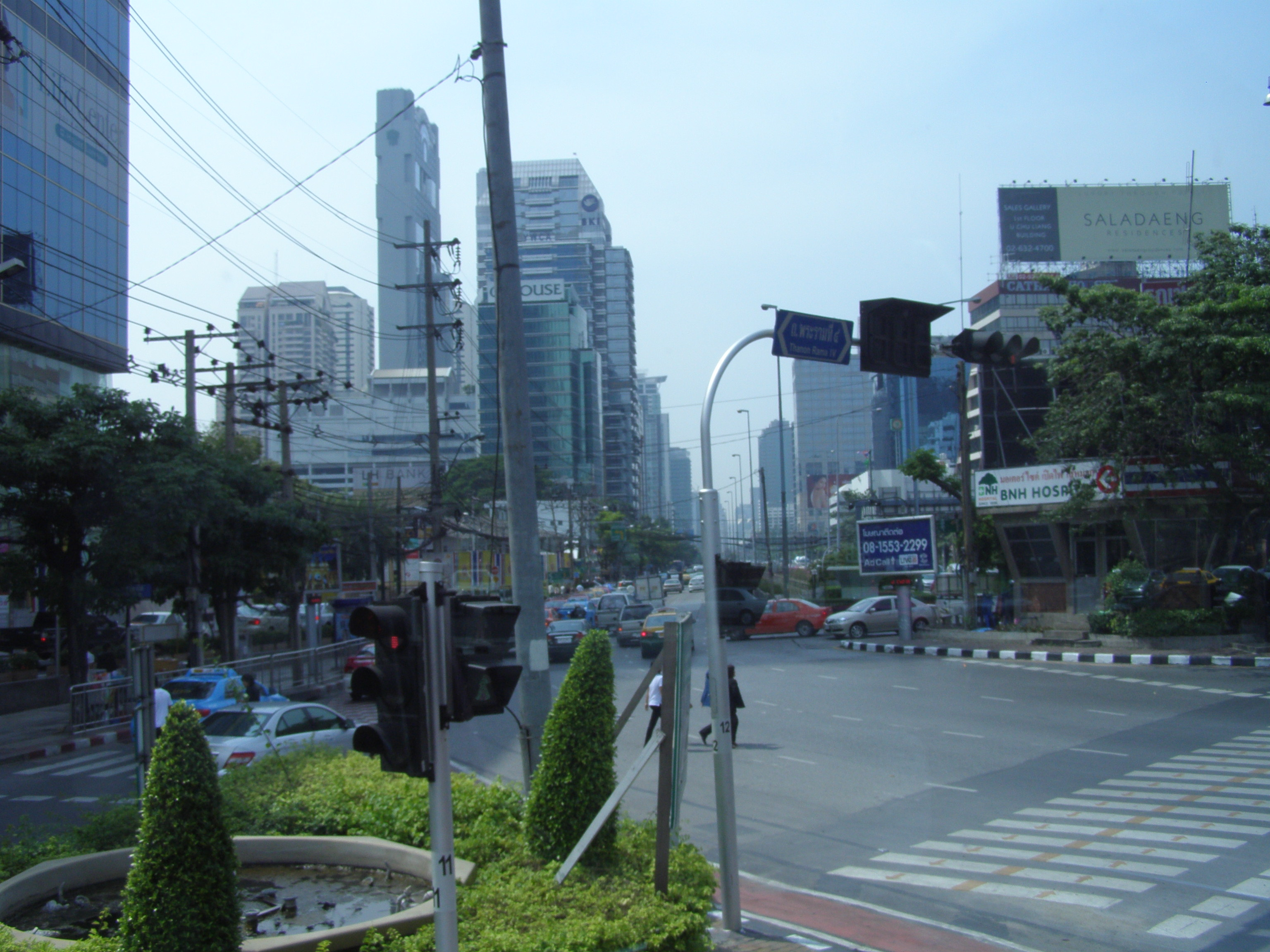 View Bangkok By HS3CMI